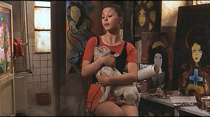 Screenshot del film Trastevere (1971) di Fausto Tozzi